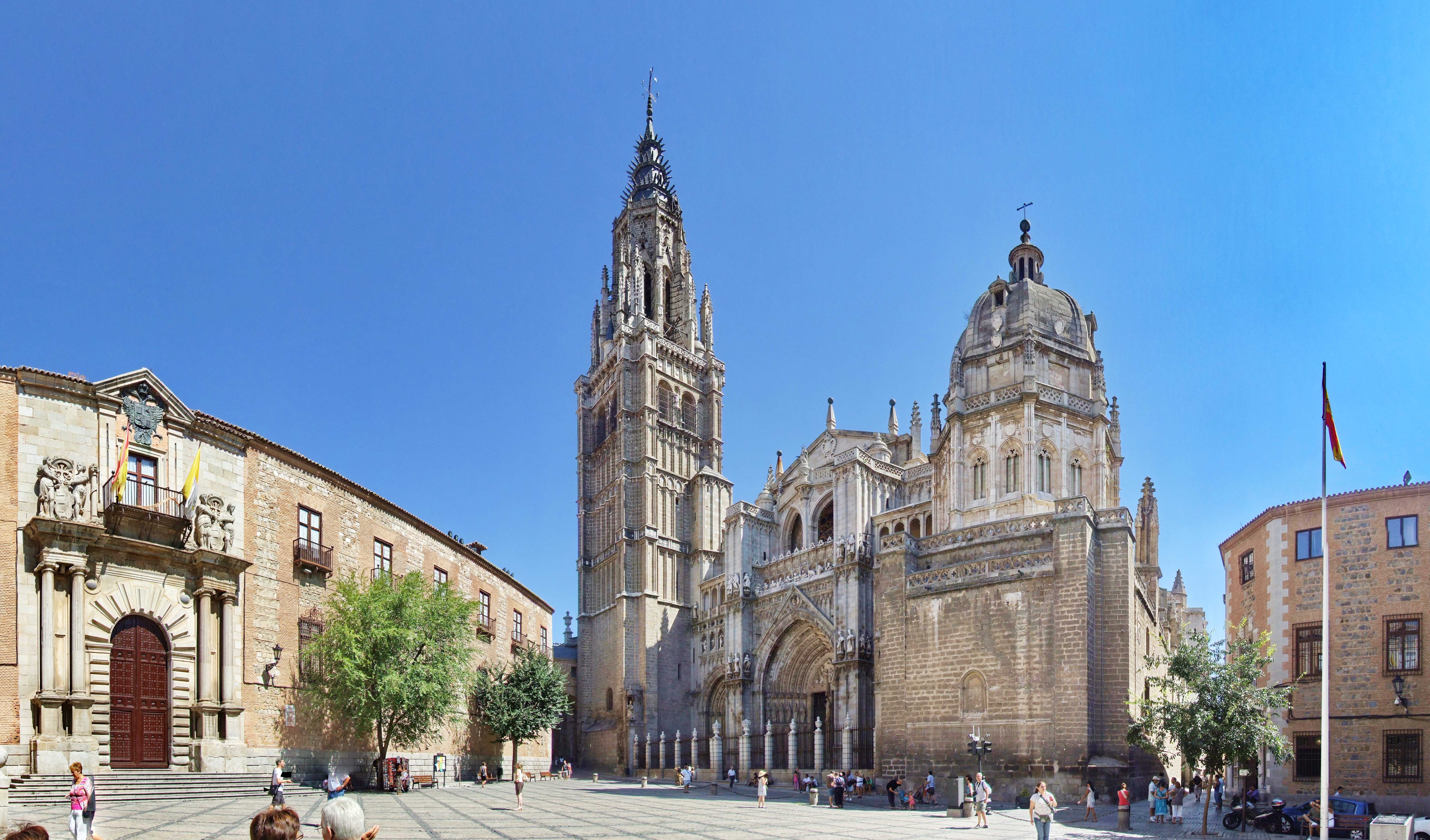 Plaza del Ayuntamiento, vista de la Catedral de Toledo (Catedral de Santa María de Toledo o, Catedral Primada de Toledo) y a la izquierda el Palacio Arzobispal de Toledo